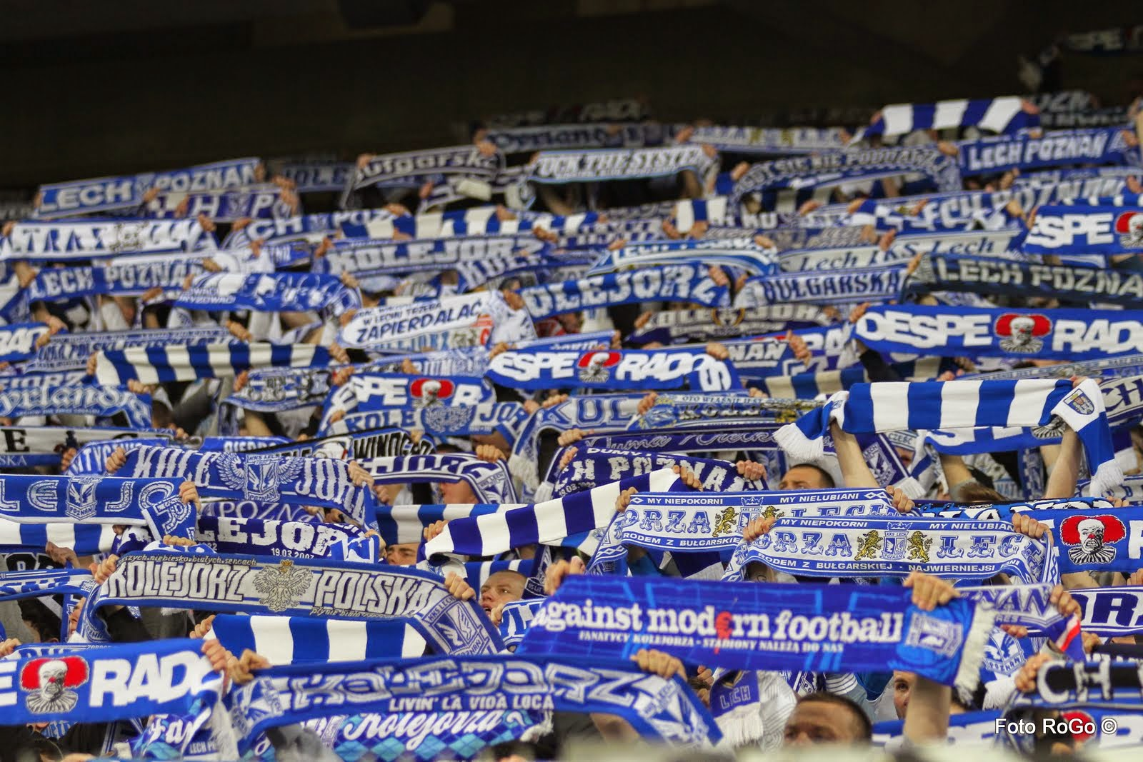 Kibice Lecha Poznań podczas meczu półfinału Pucharu Polski, Lech Poznań - Błękitni Stargard Szczeciński w 2015 roku.